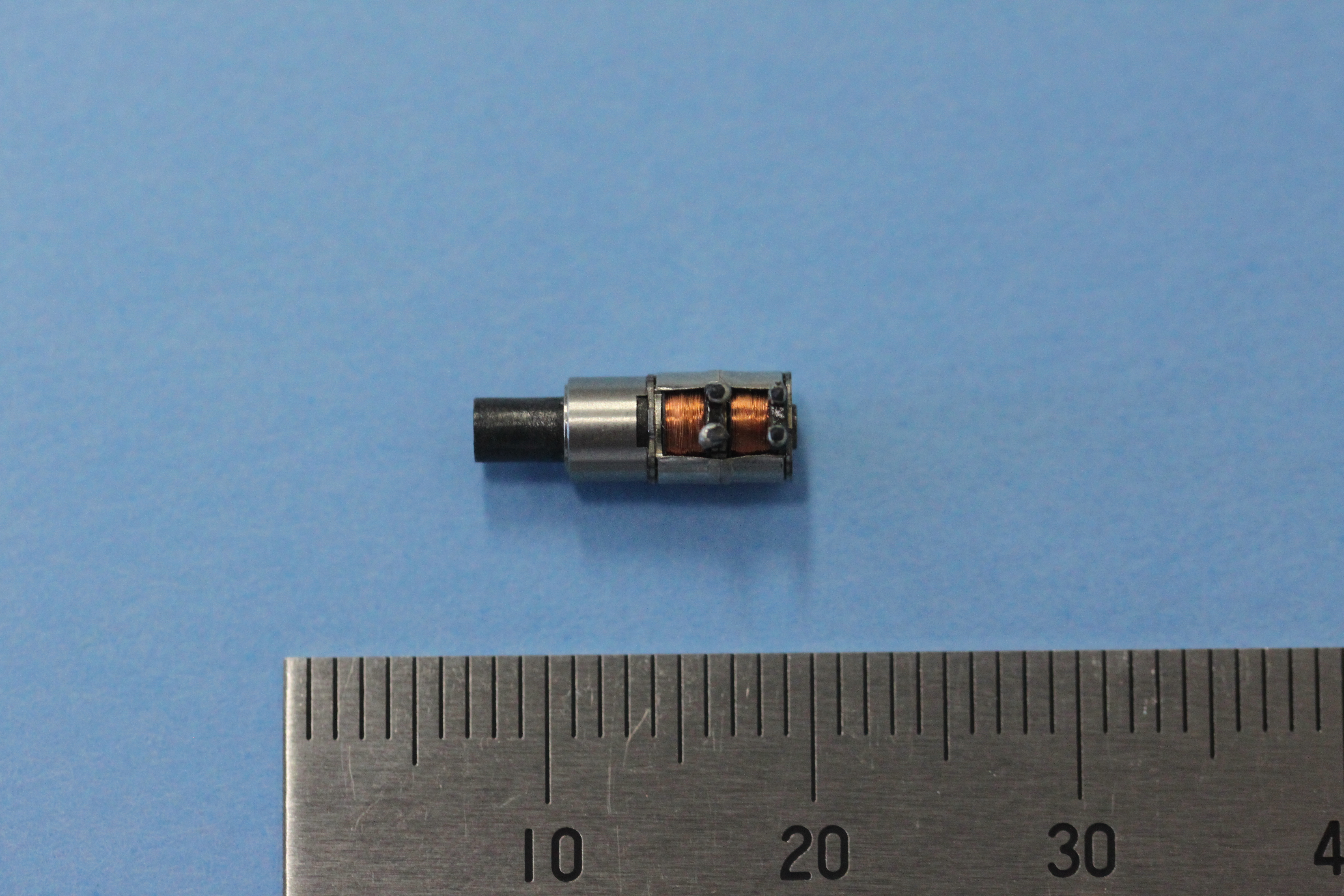 (株)アイカムス・ラボ 製品２